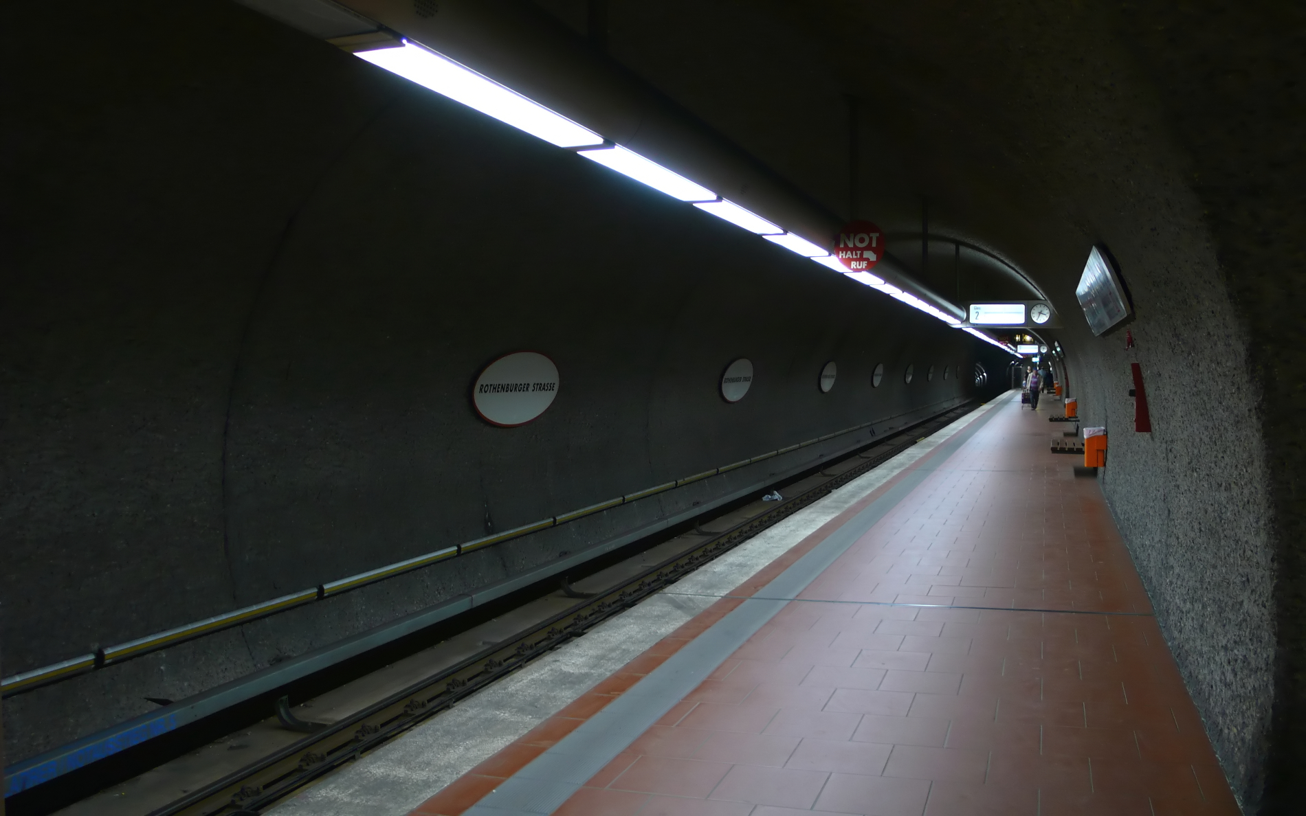 U-Bahnhof Rothenburger Straße der U-Bahn Nürnberg, Bahnsteigebene (Gleis 2), Blick von Norden